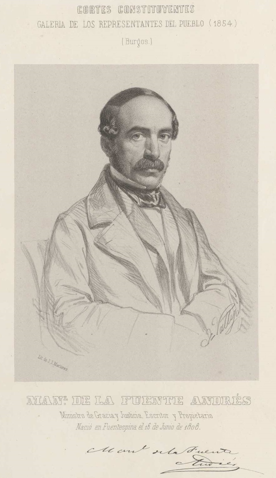 Retrato de Manuel de la Fuente Andrés, litografía de José Vallejo Galeazo: Cortes constituyentes: galería de los representantes del pueblo (1854) / (Burgos). Inscripción al pie: Man.l de la Fuente Andrés. Ministro de Gracia y Justicia, Escritor y Propietario. / Nació en Fuentespina el 16 de Junio de 1808. Facsímil de la firma.. Lit. de J.J. Martínez. Biblioteca Nacional de España